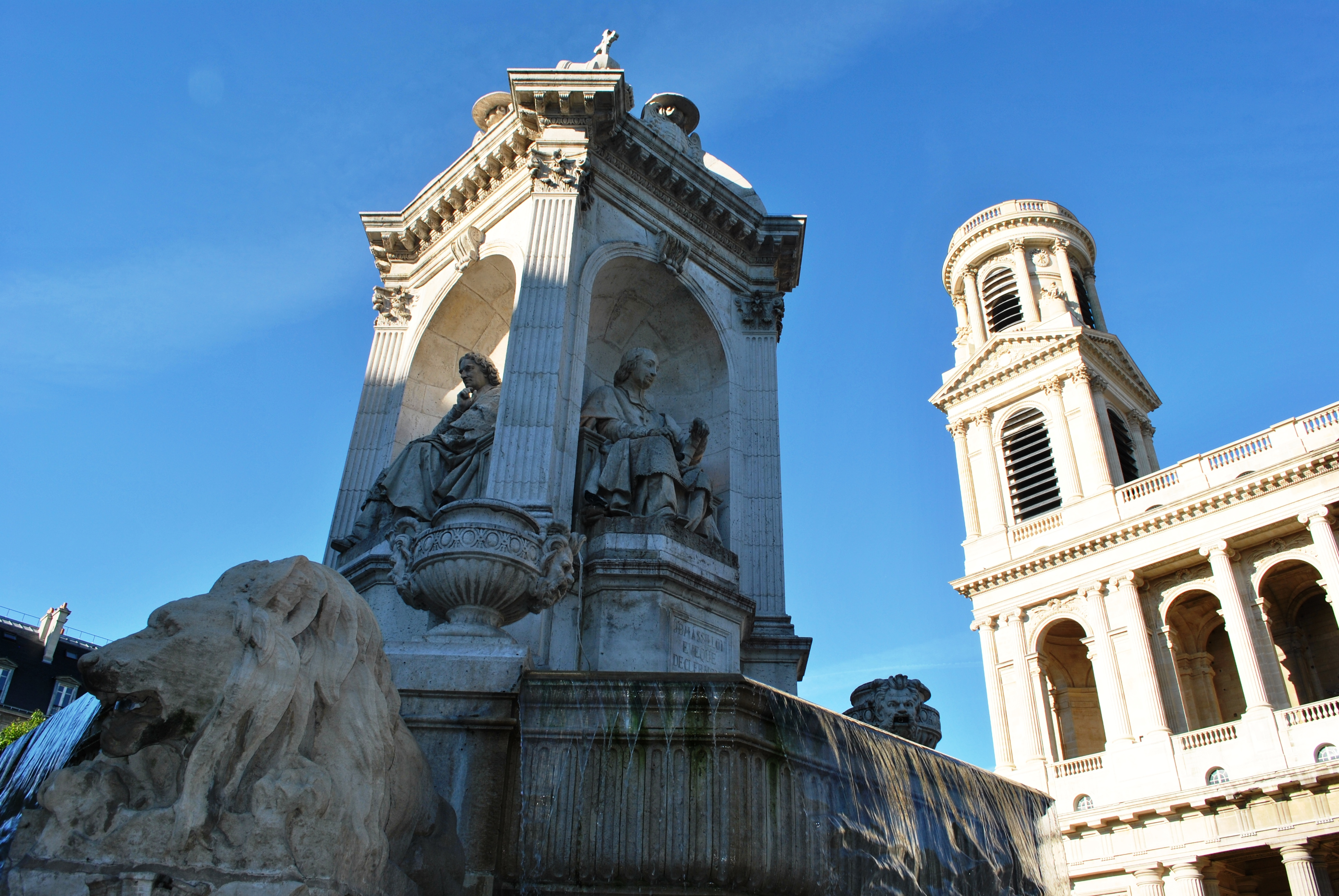 Fontaine Saint-Sulpice (Inscrit) .